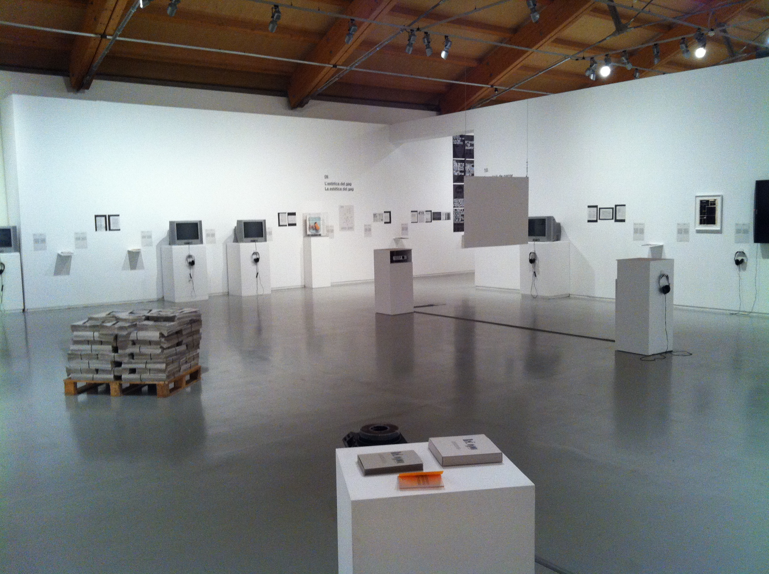 Centre d'Art la Panera Exhibition Room at Centre d'Art la Panera